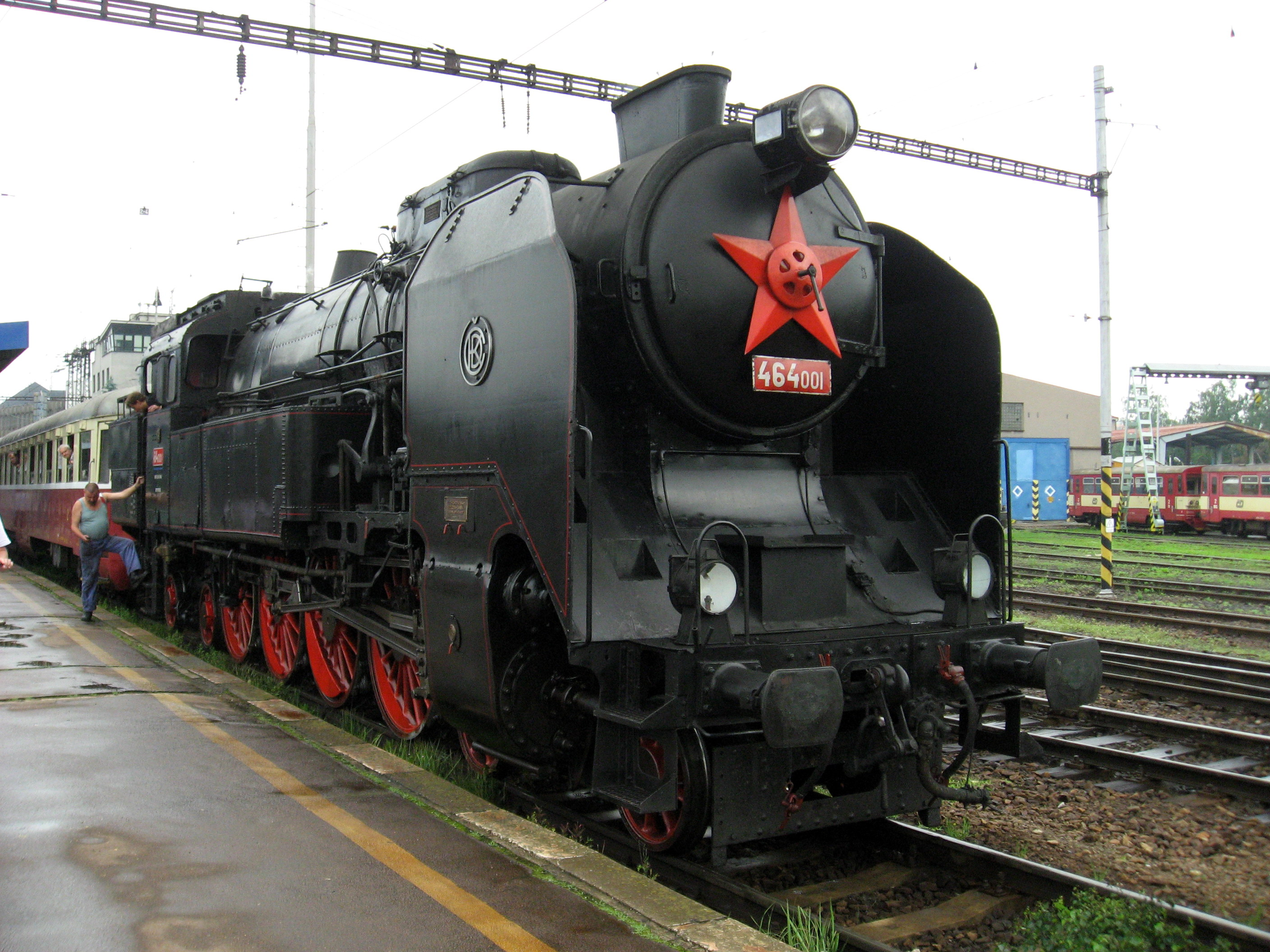 Parní lokomotiva 464 v Havlíčkově Brodě